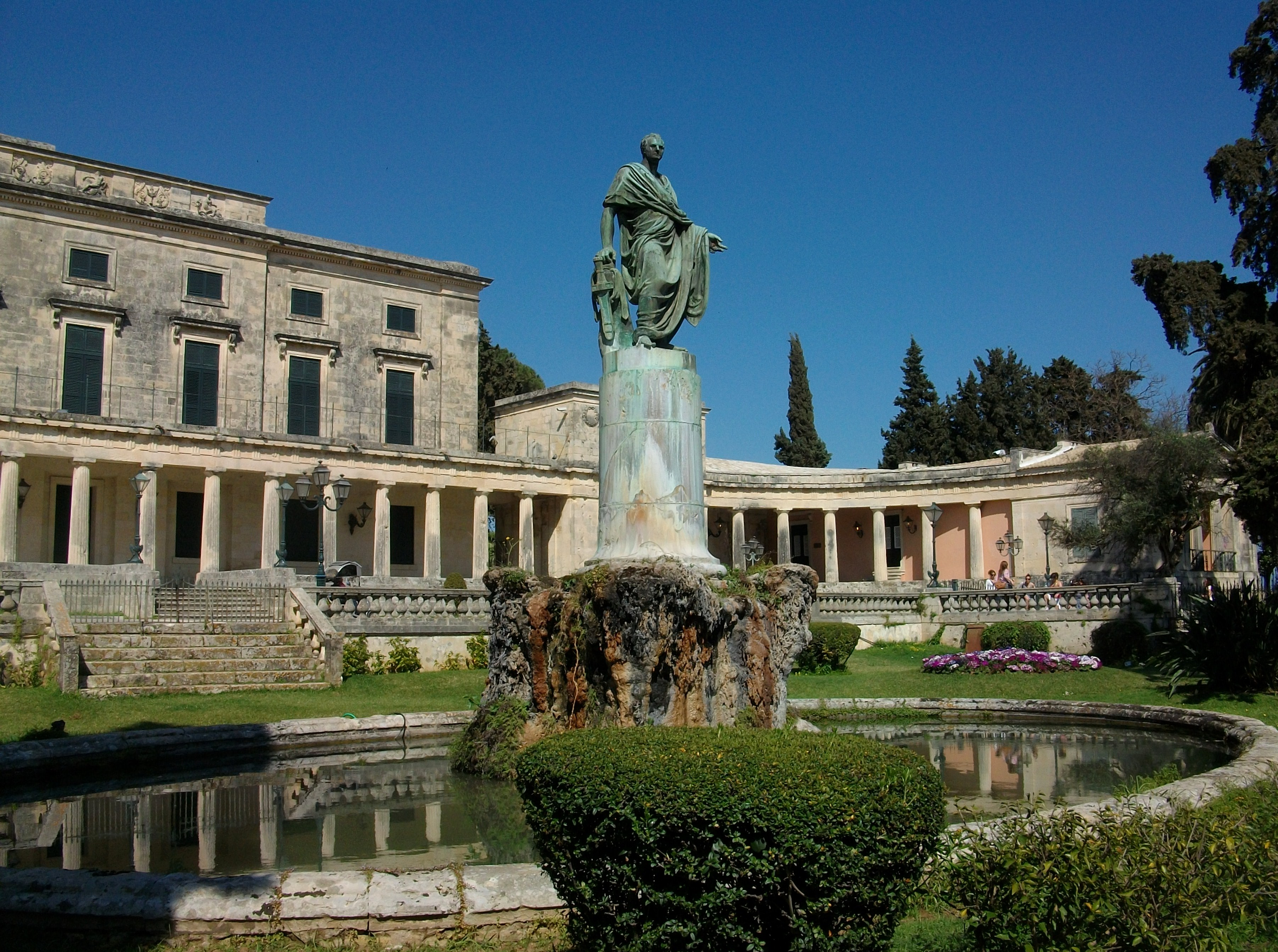 Estàtua de Sir Frederick Adam, Palaia Anaktora, Corfú.